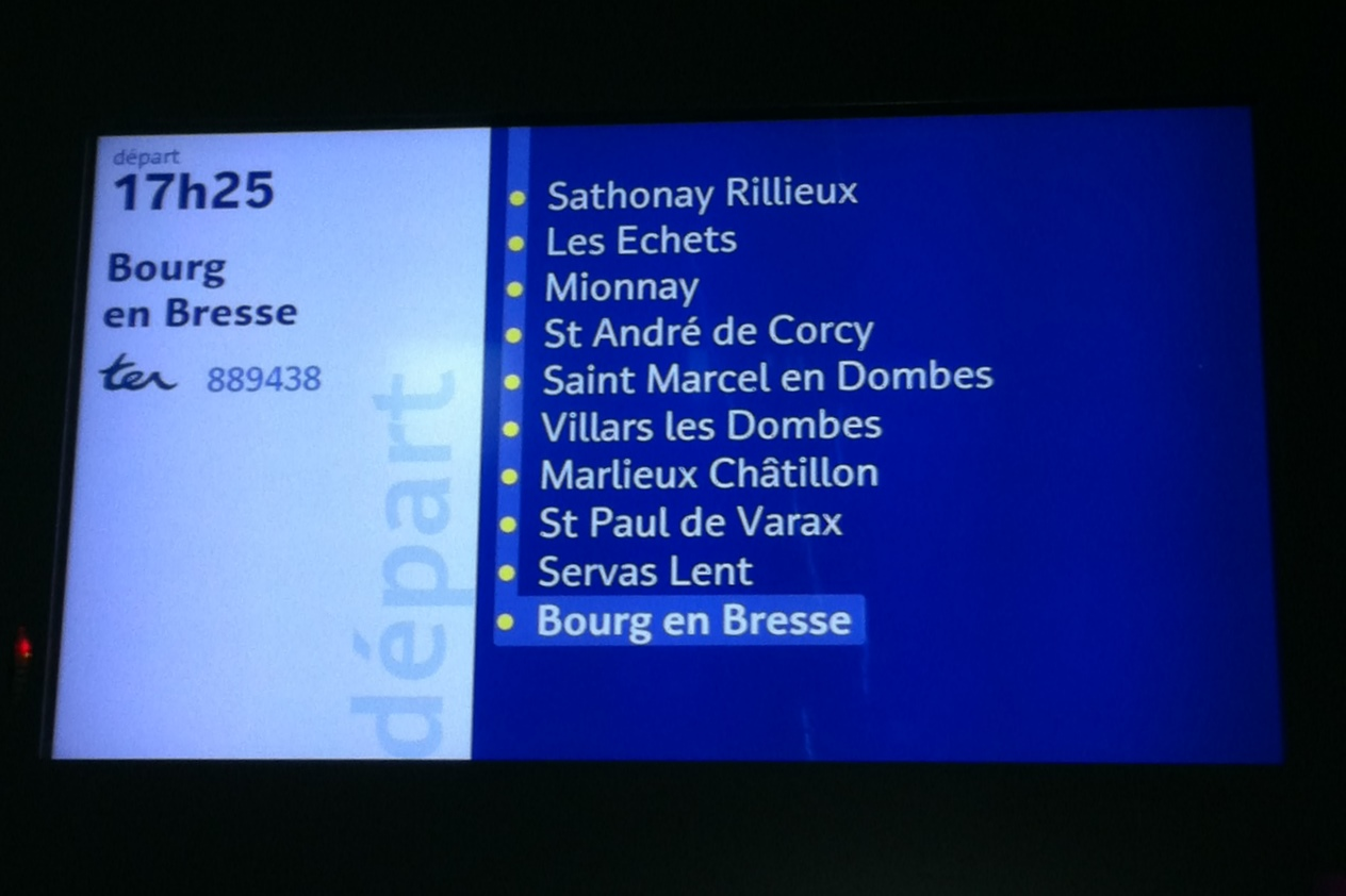 Tableau de la ligne Lyon - Bourg-en-Bresse à Part-Dieu.